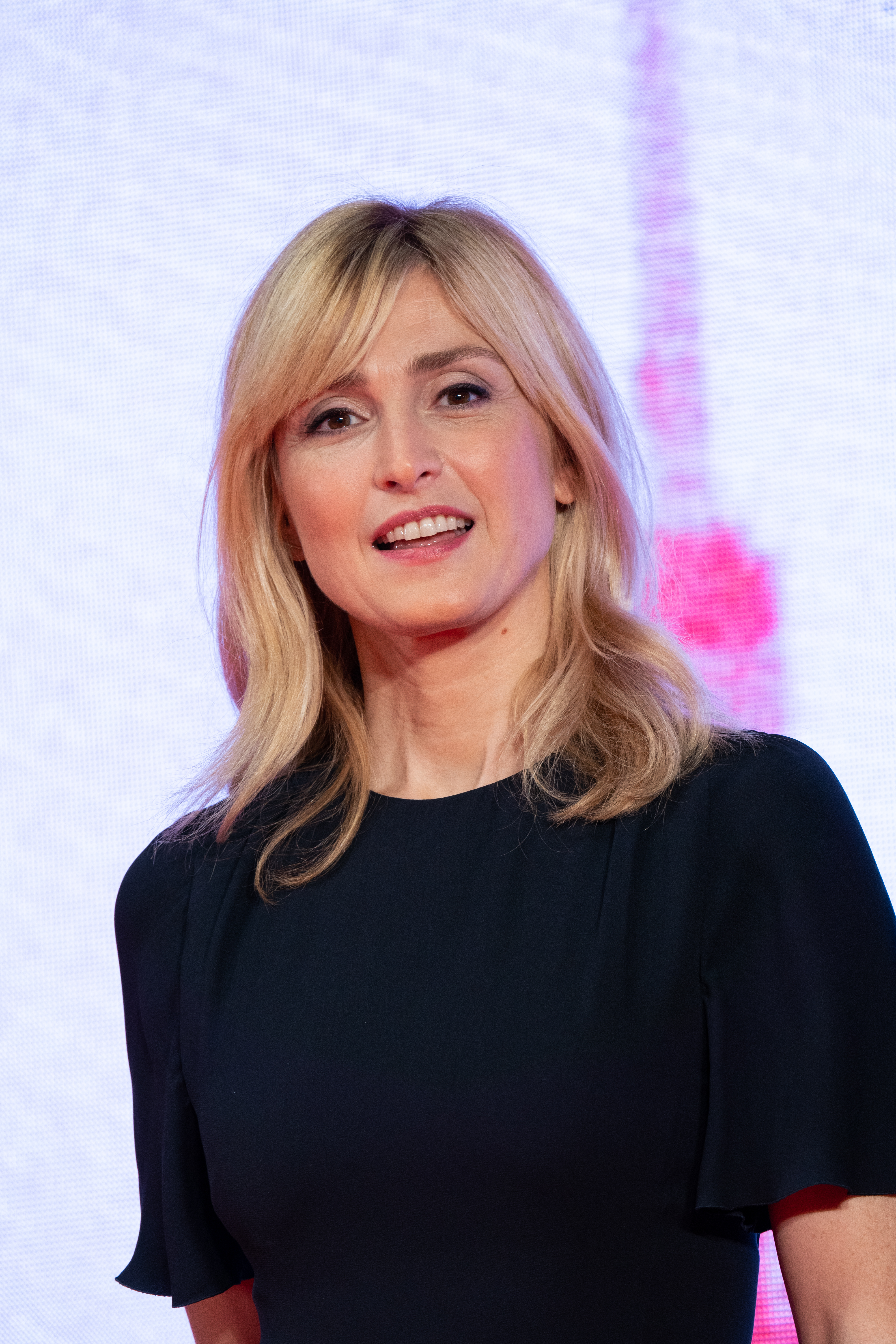 第32回 東京国際映画祭 オープニングセレモニー ジュリー・ガイエ (審査委員)